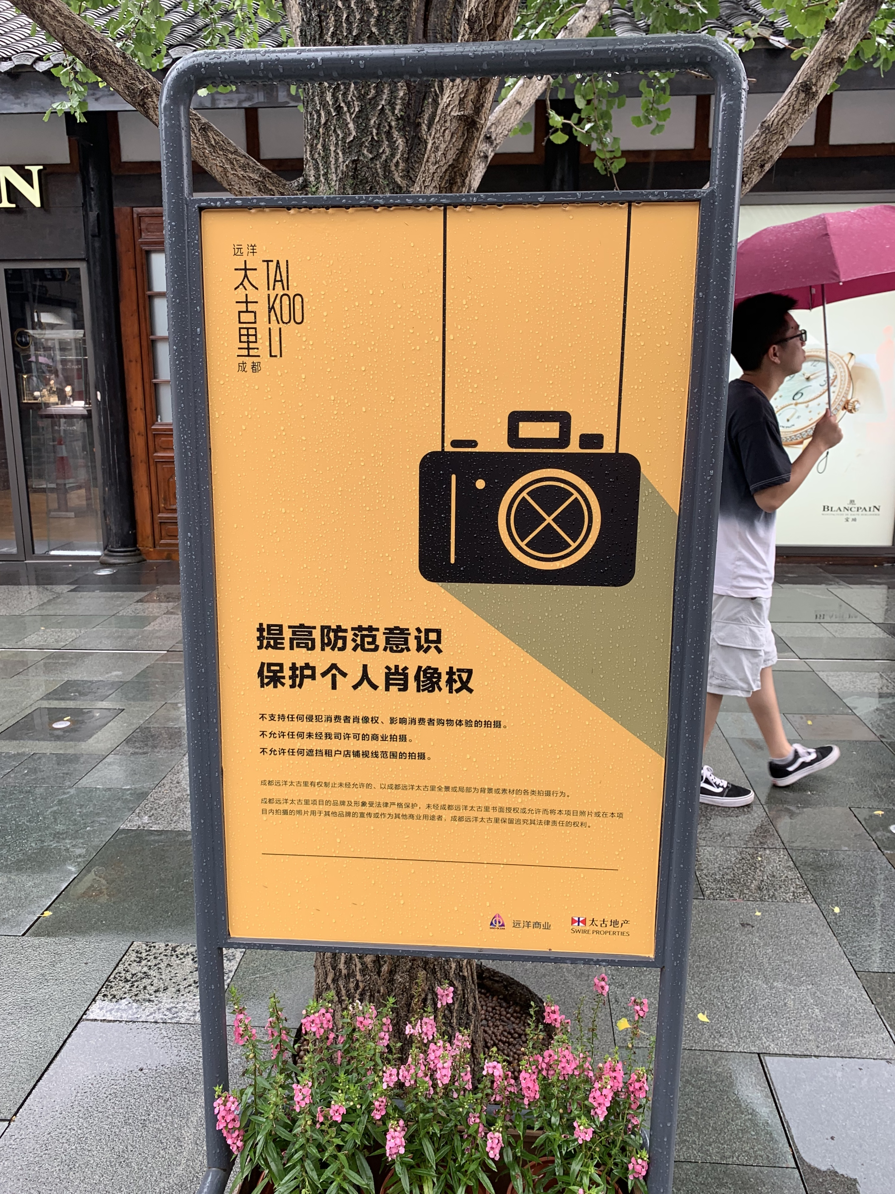 成都远洋太古里内禁止拍照的告示